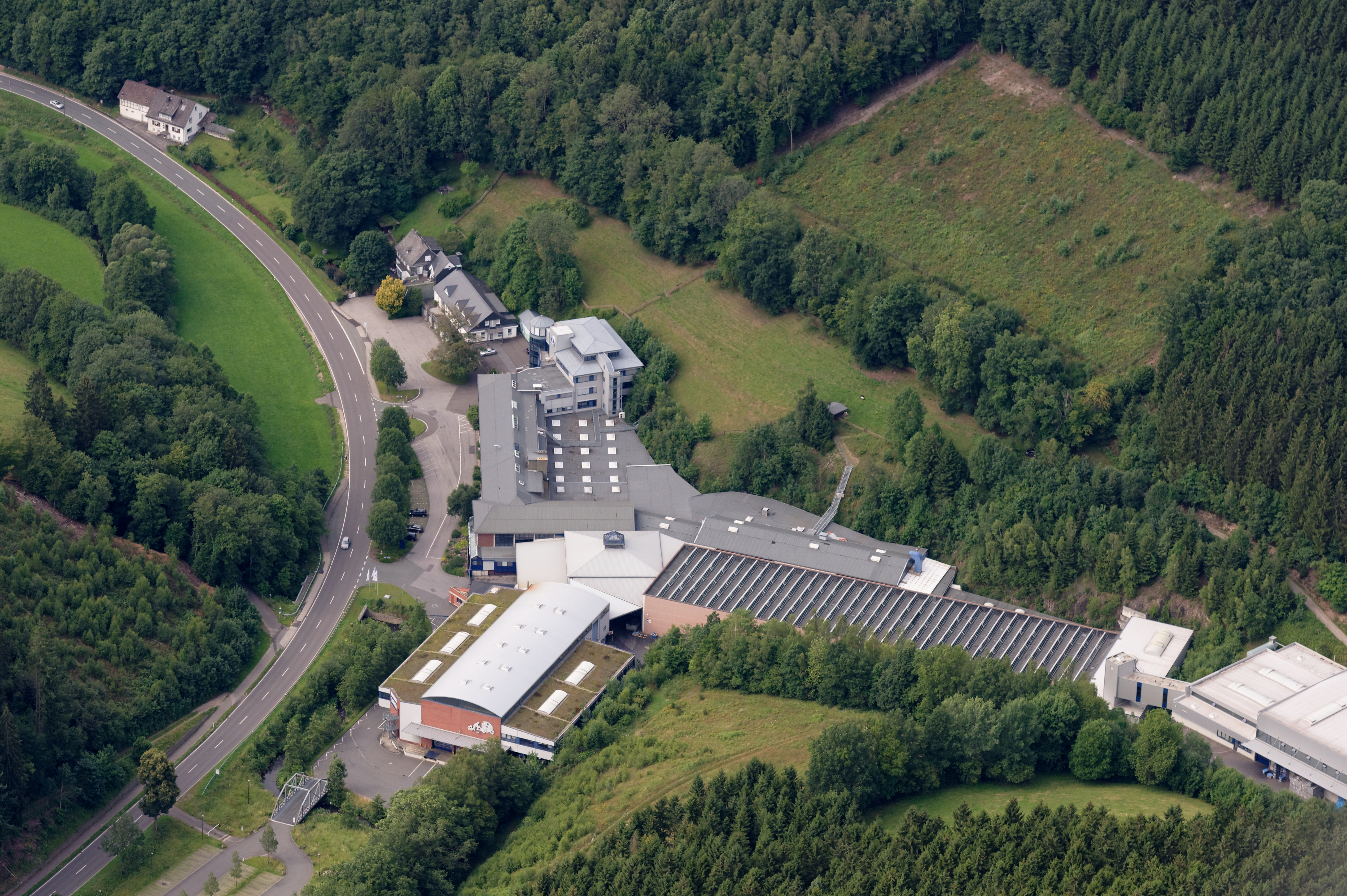 Luftaufnahme: Werksgebäude der Fa. Egon Grosshaus im Tal der Veischede; Bundesstraße 55, Nordrhein-Westfalen